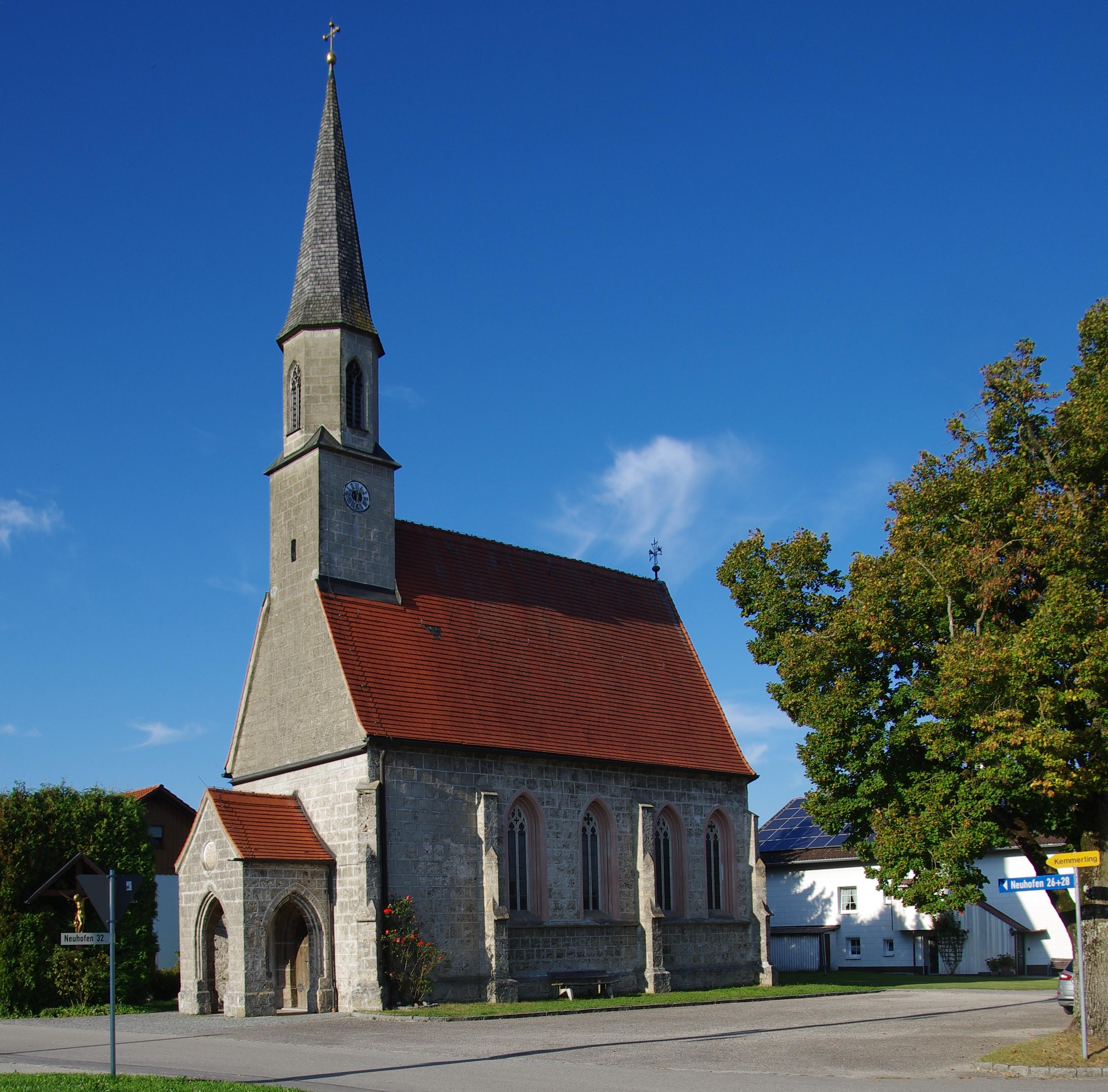 Filialkirche St. Nikolaus im Haiming, Ortsteil Neuhofen Boarisch: Filialkirch St. Nikolaus in Hoaming, Ortschaft NeuhofenThis is a photograph of an architectural monument.